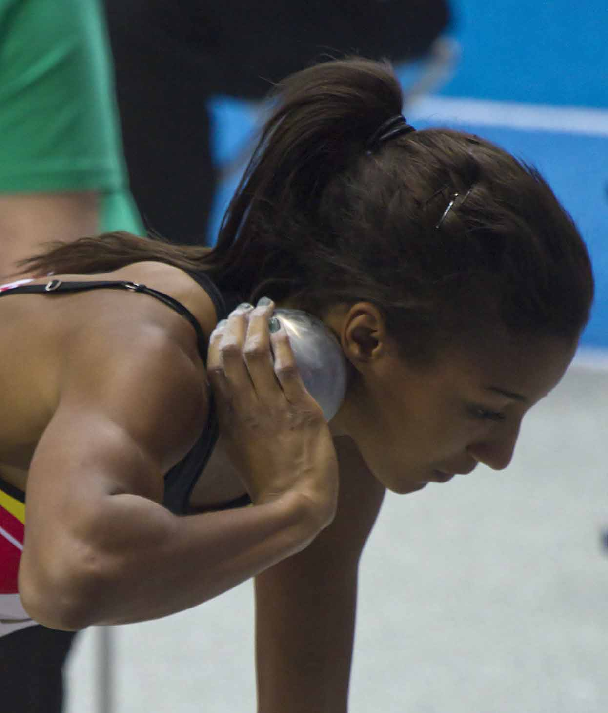 157 nafi thiam kogel